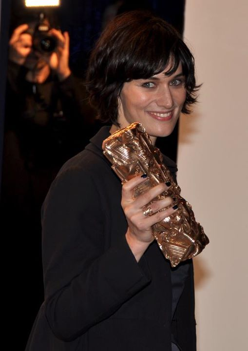 Clotilde Hesme à la cérémonie des César